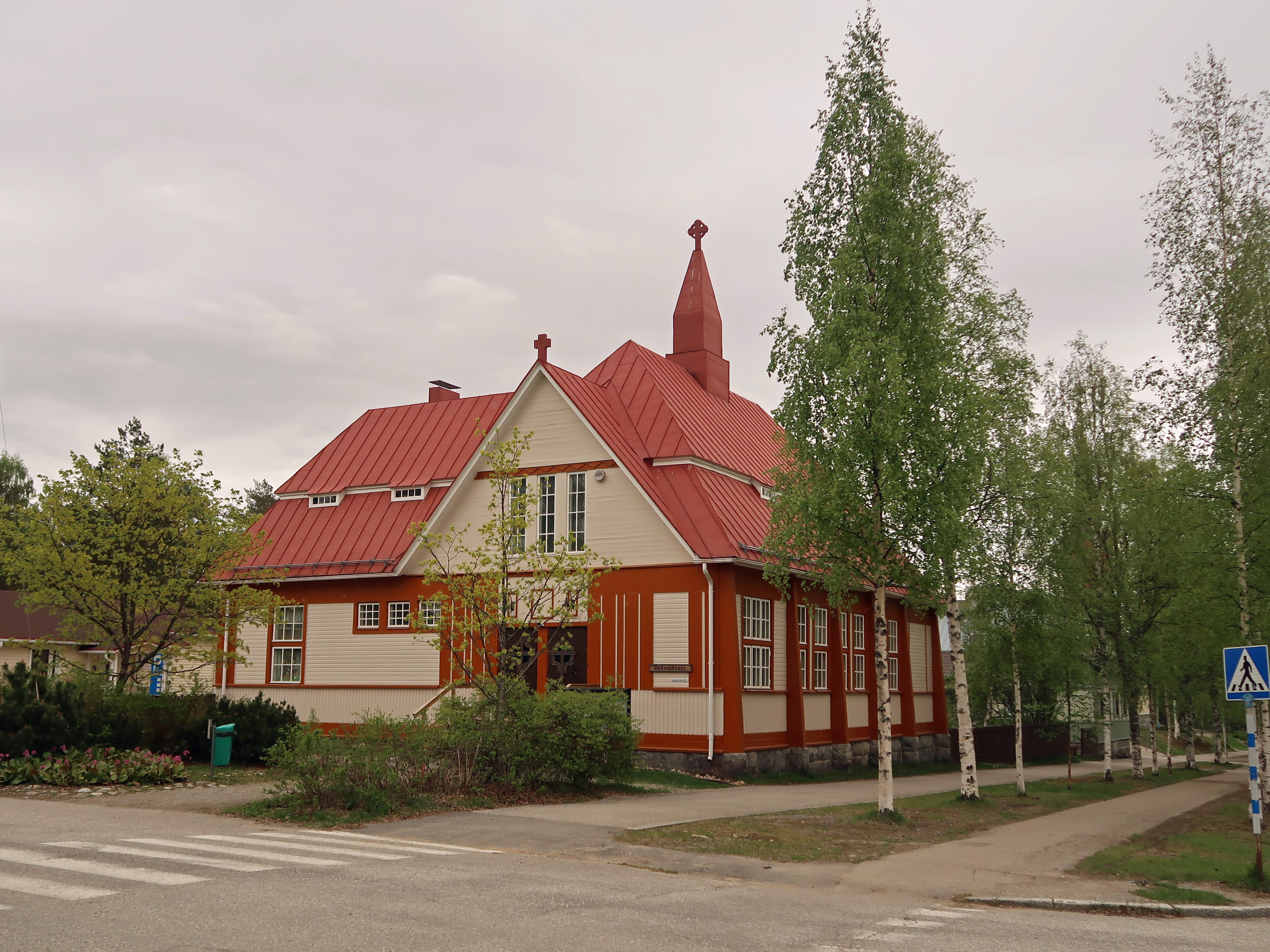 Nurmeksen rukoushuone